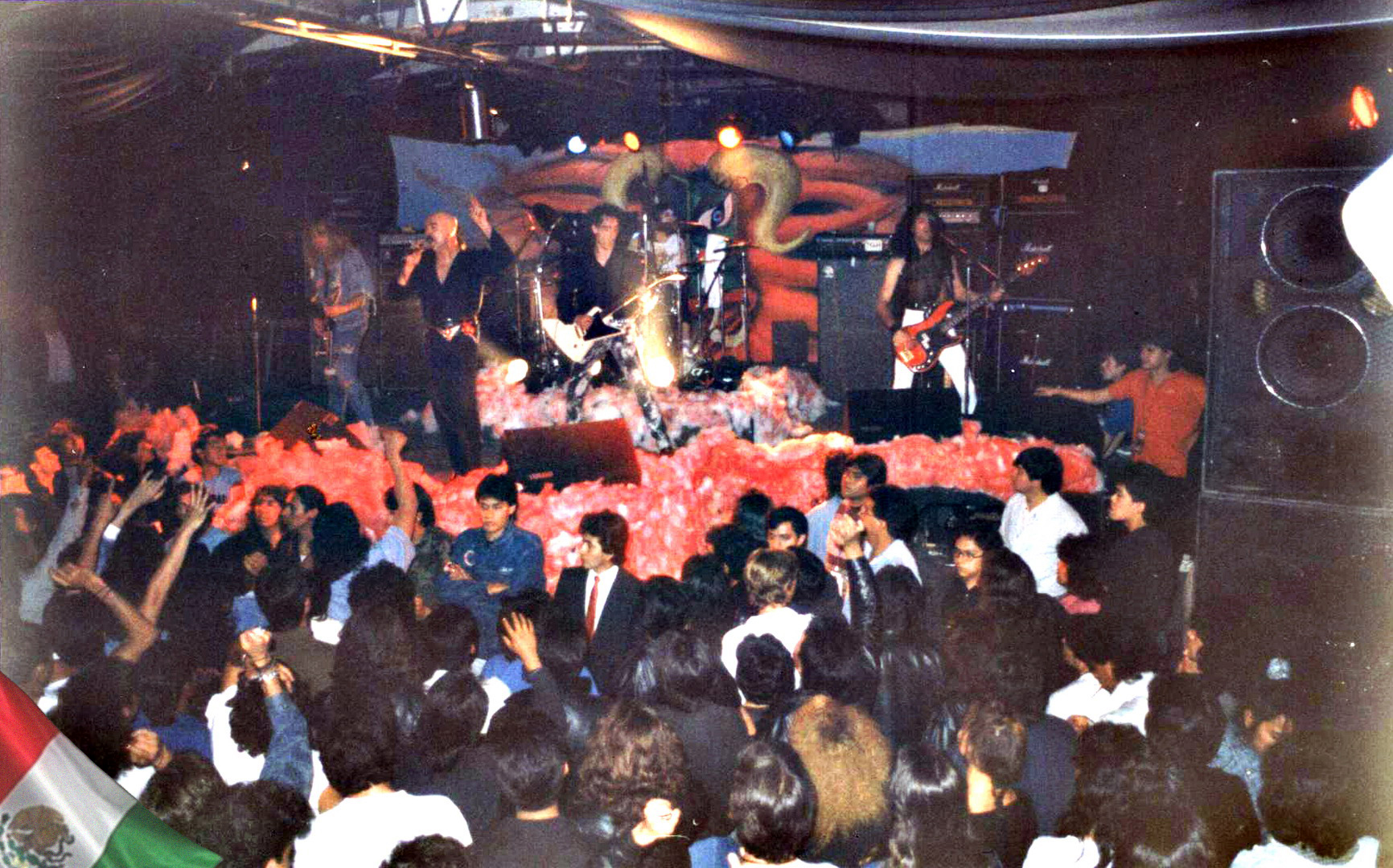 Primeros conciertos de Ángeles del infierno en Tierras Mexicanas 3ªFormación: Robert, Juan, Manu, Carlucho, Santi - 1990